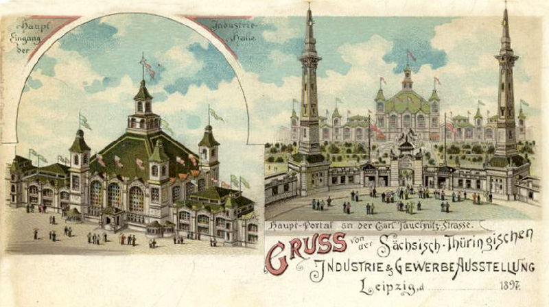 Sächsisch-thüringische Industrie- und Gewerbeausstellung Leipzig 1897, Haupteingang und Industriehalle